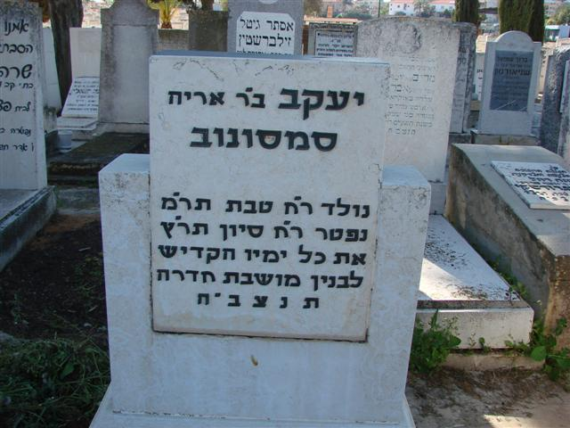 Samsonov Yaakov grave